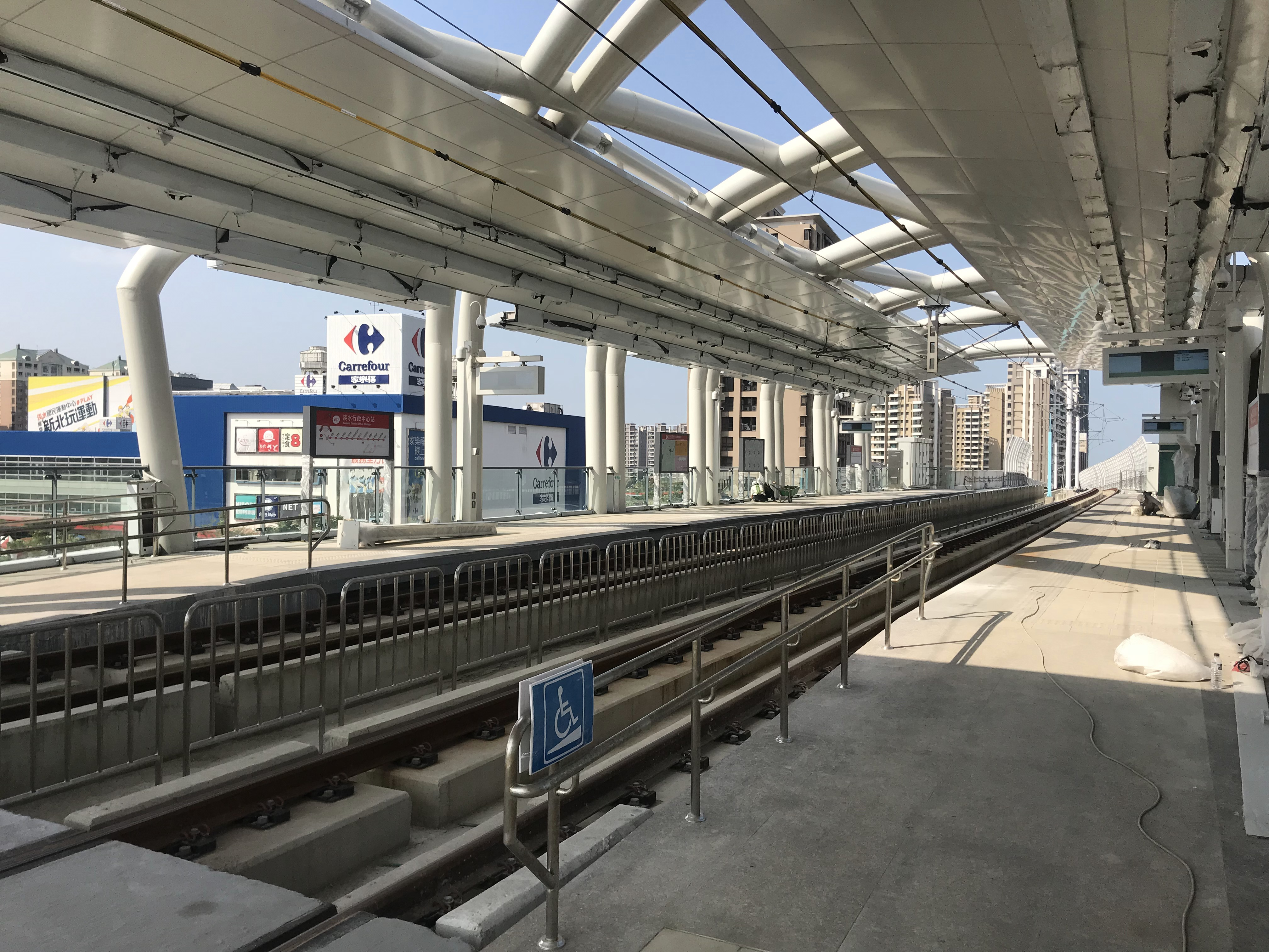 中文（台灣）: 淡海輕軌淡水行政中心站